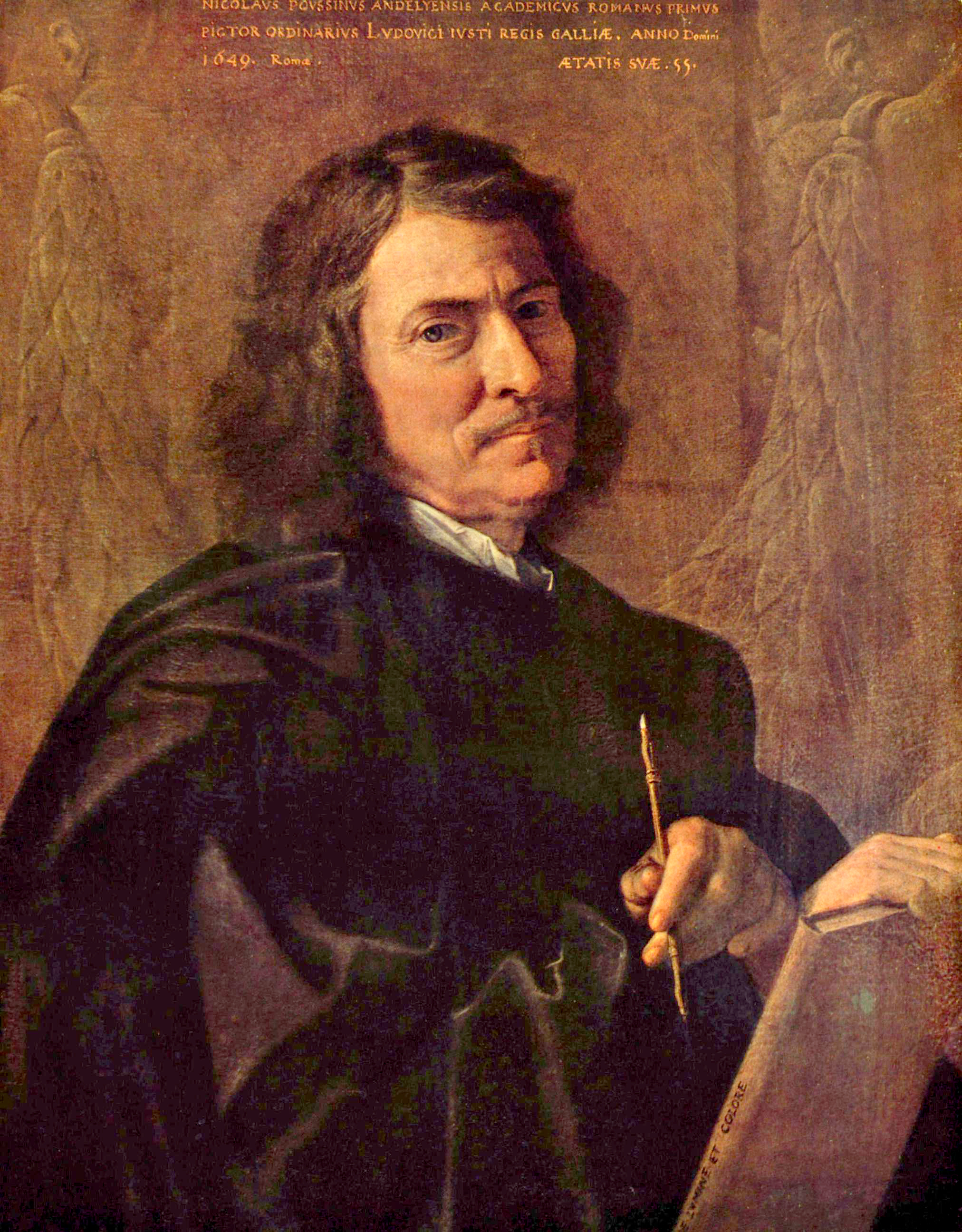 Selbstporträt des Künstlers